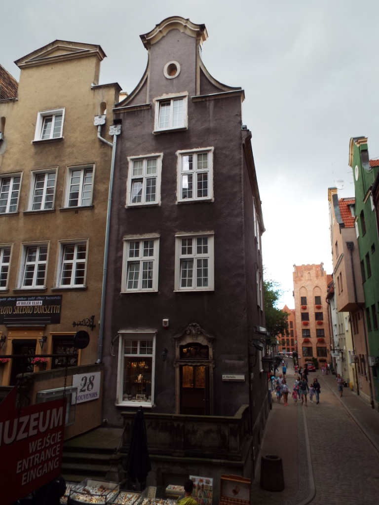 Gdańsk Główne Miasto, ul. Mariacka 28 - kamienica